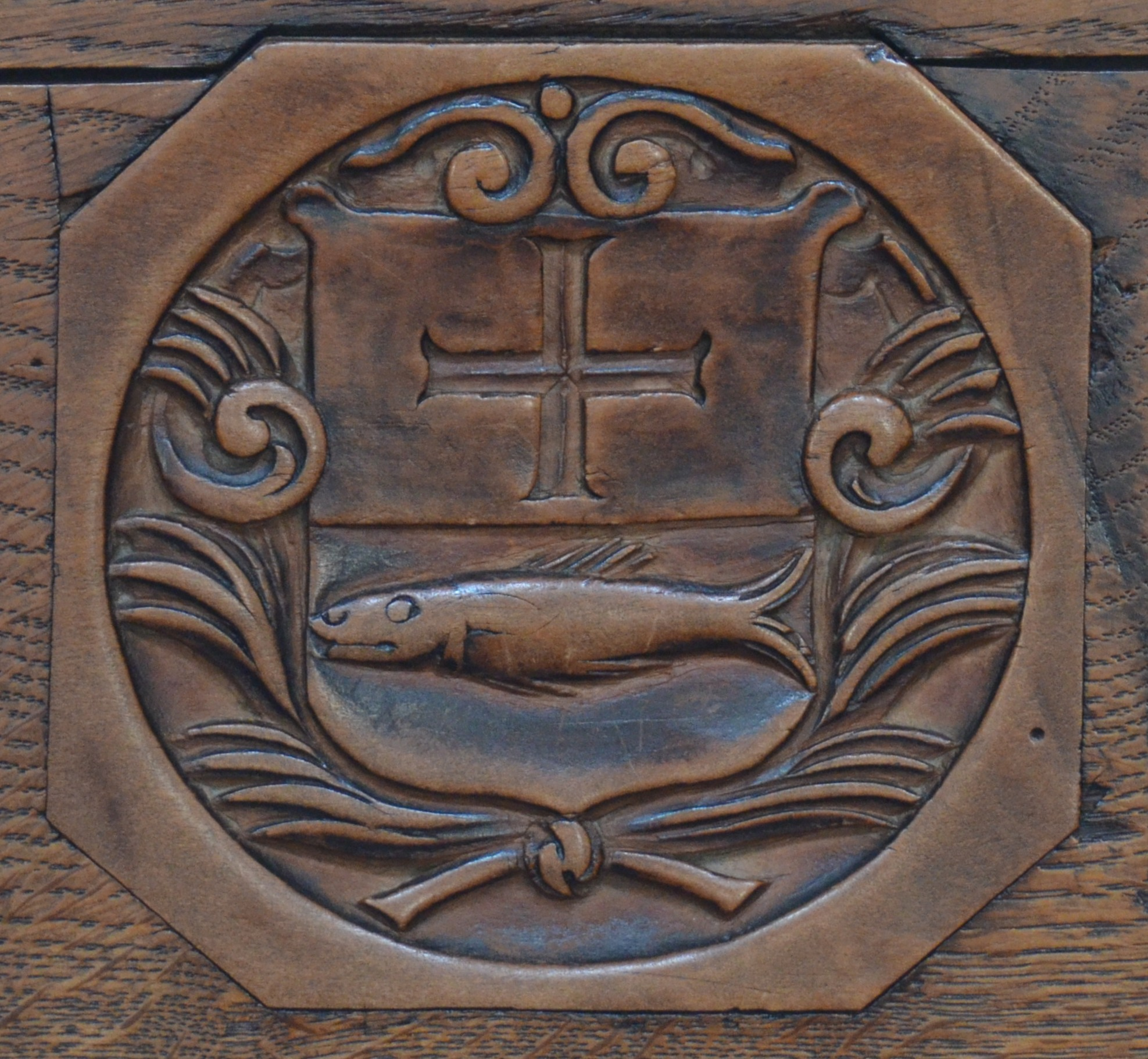 Bern, Münster, Kirchenortschild Bondeli (Detail)